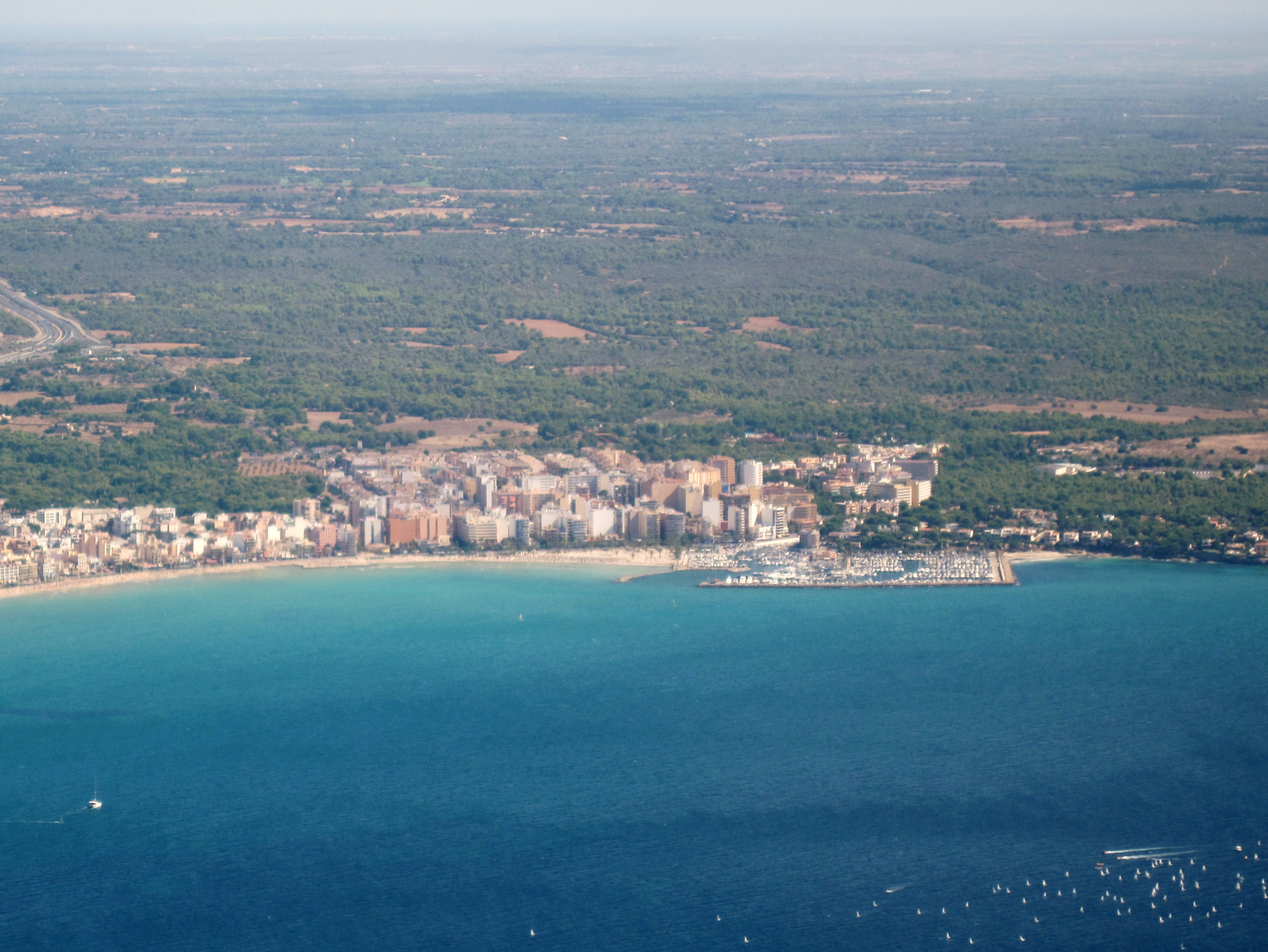 Luftbild von S’Arenal an der Platja de Palma, Mallorca, Spanien